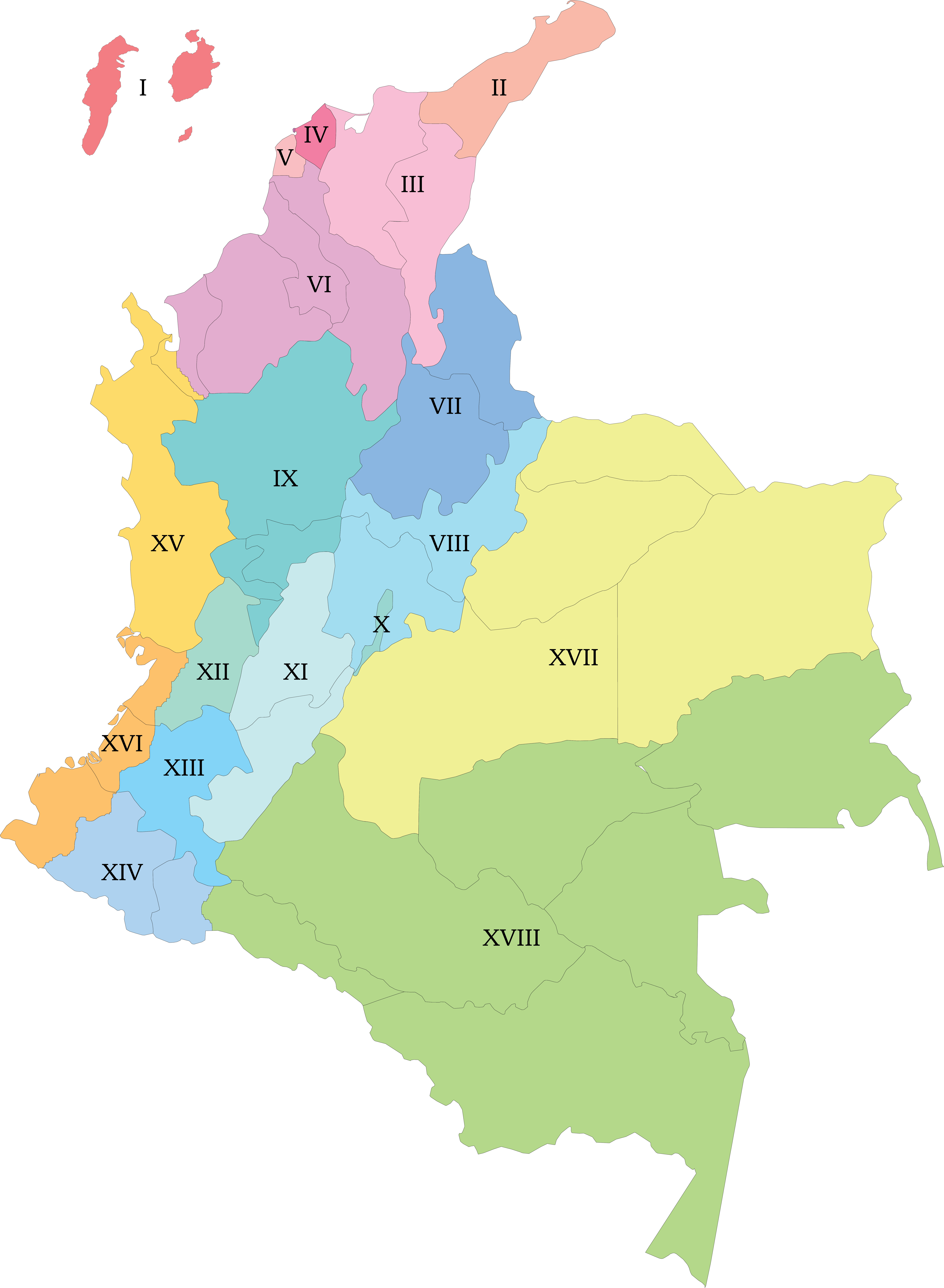 Mapa gastronómico de Colombia